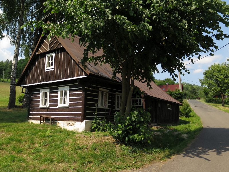 Dům čp. 43, Františkov 43, Františkov (Rokytnice nad Jizerou).